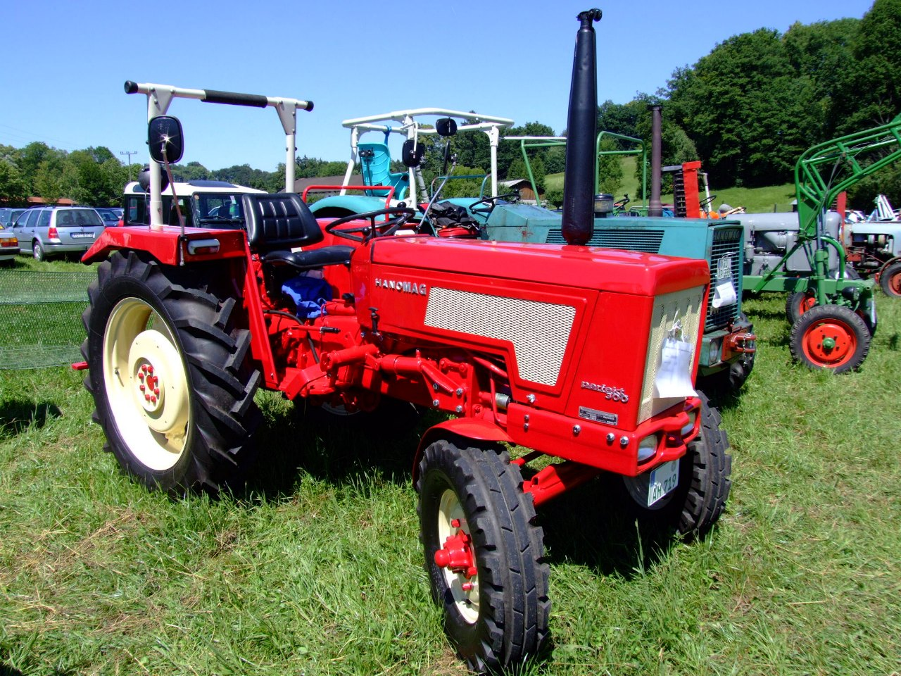 Hanomag Perfekt 300 (Perfekt 301) mit 24 PS, Baujahr 1964